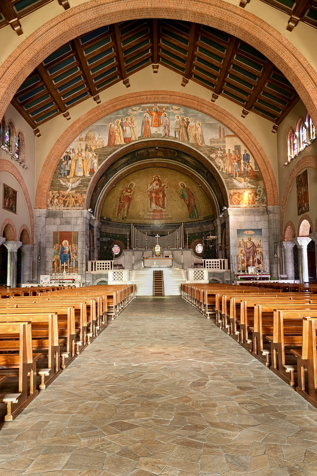 Chiesa nuova dei Santi Apostoli Pietro e Paolo di Sacconago This is a photo of a monument which is part of cultural heritage of Italy.